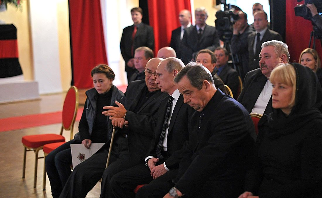 Прощание с маршалом Сергеем Соколовым